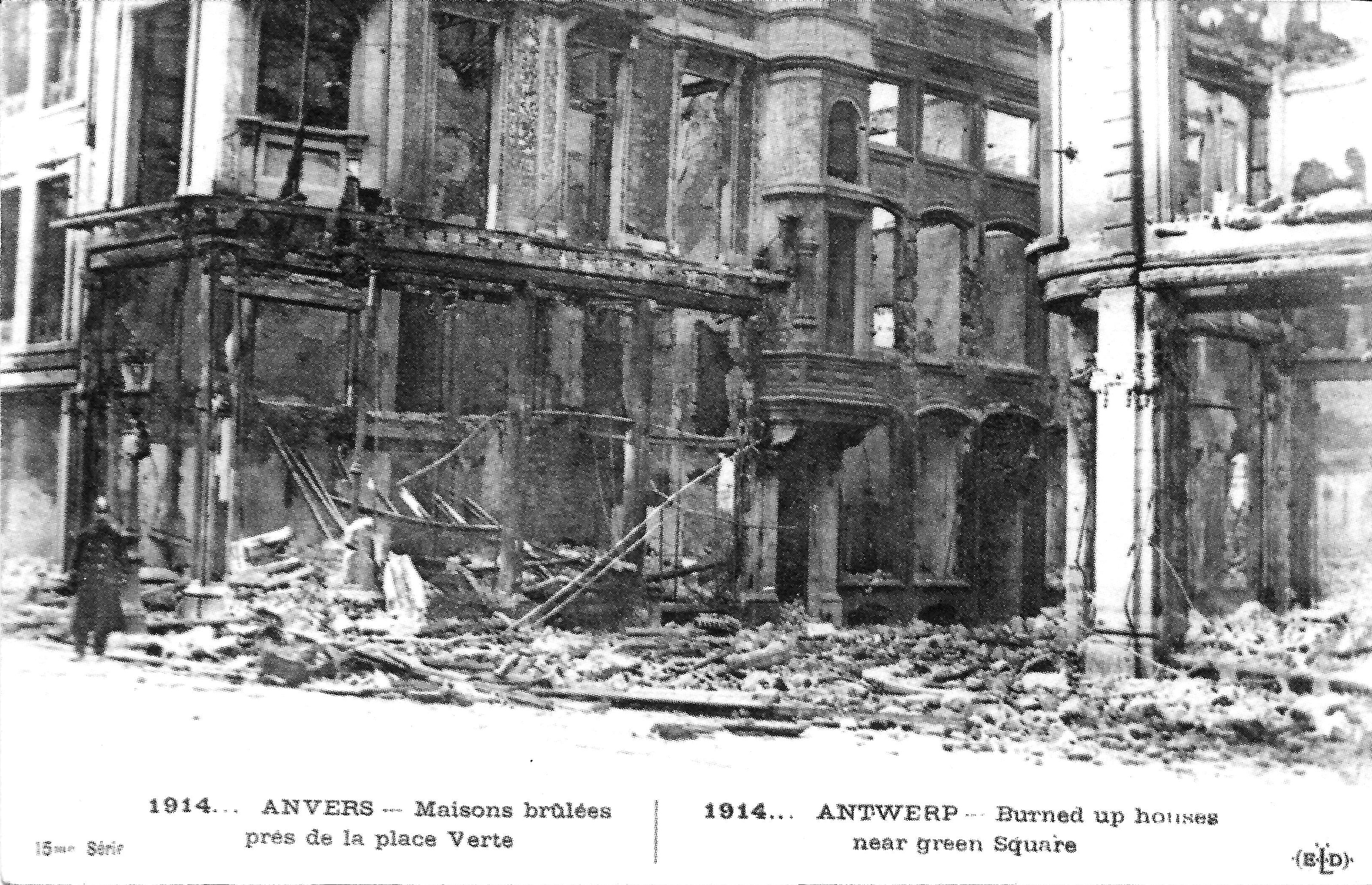 Oorlogschade na de verovering van Antwerpen door de duitsers